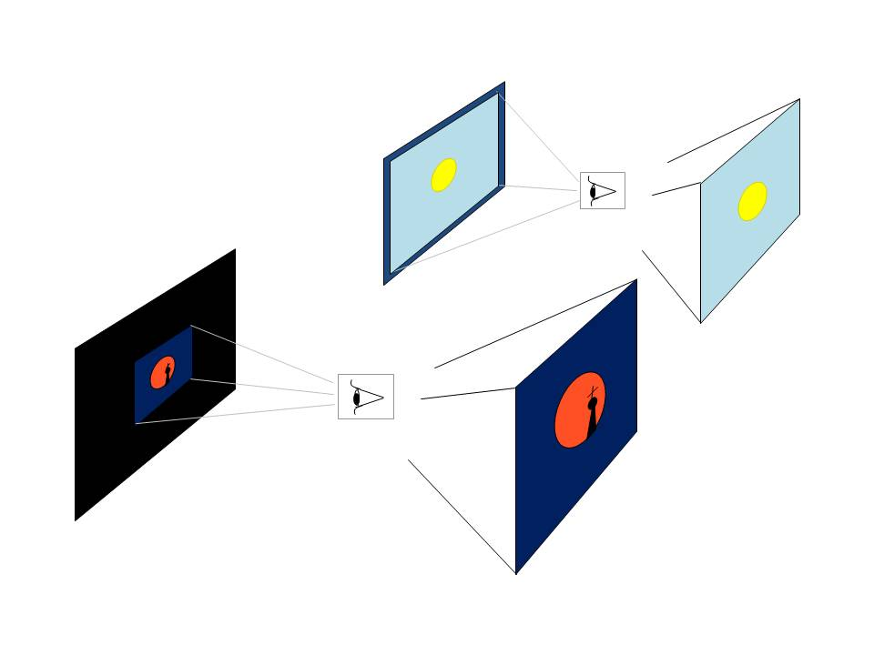 Modell zur Deutung visueller Größenillusionen